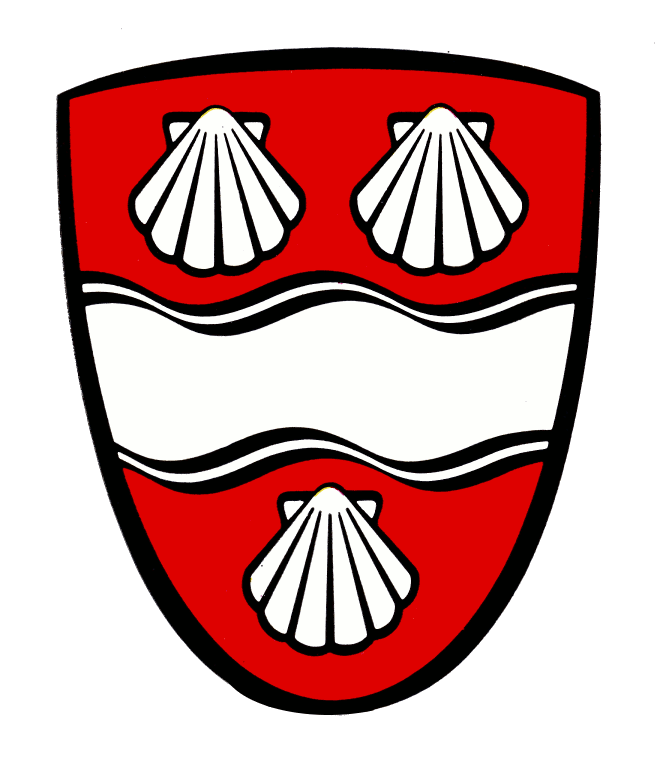 Wappen der ehemaligen Gemeinde Eyb